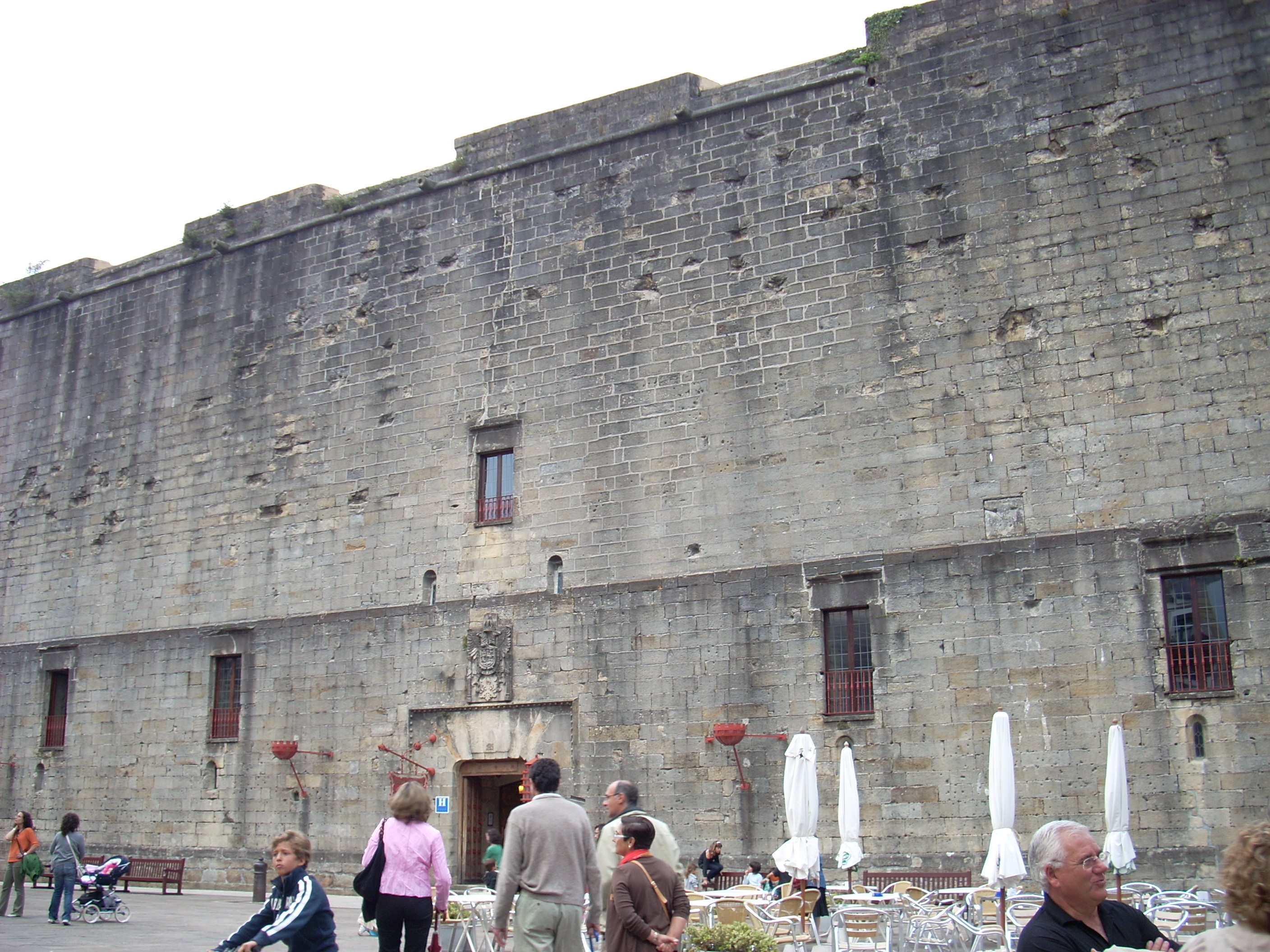 Castello di Carlo V, attuale Parador, Hondarribia, Guipúzcoa, Spagna